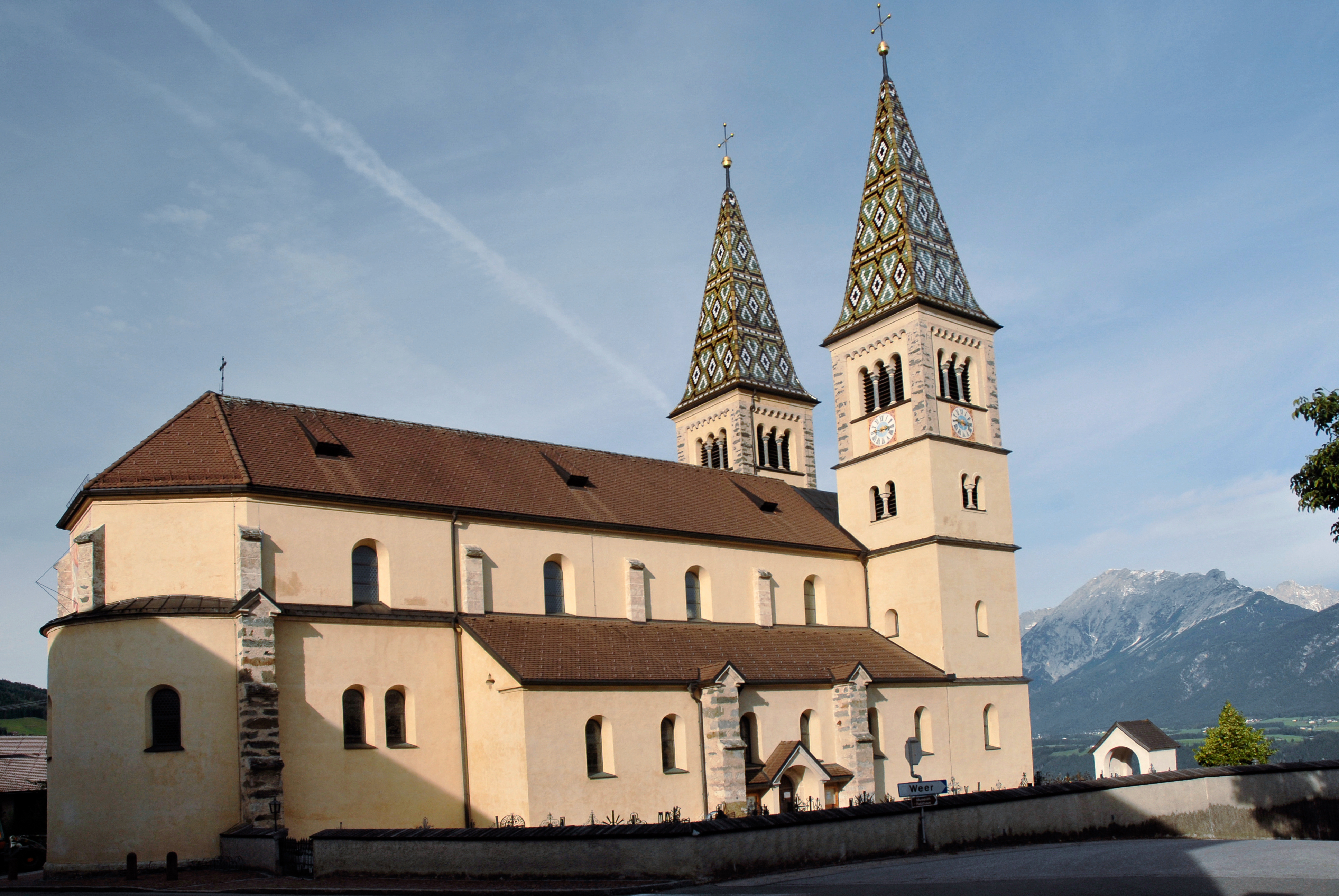 Weerberg, Maria Empfängniskirche von Südost